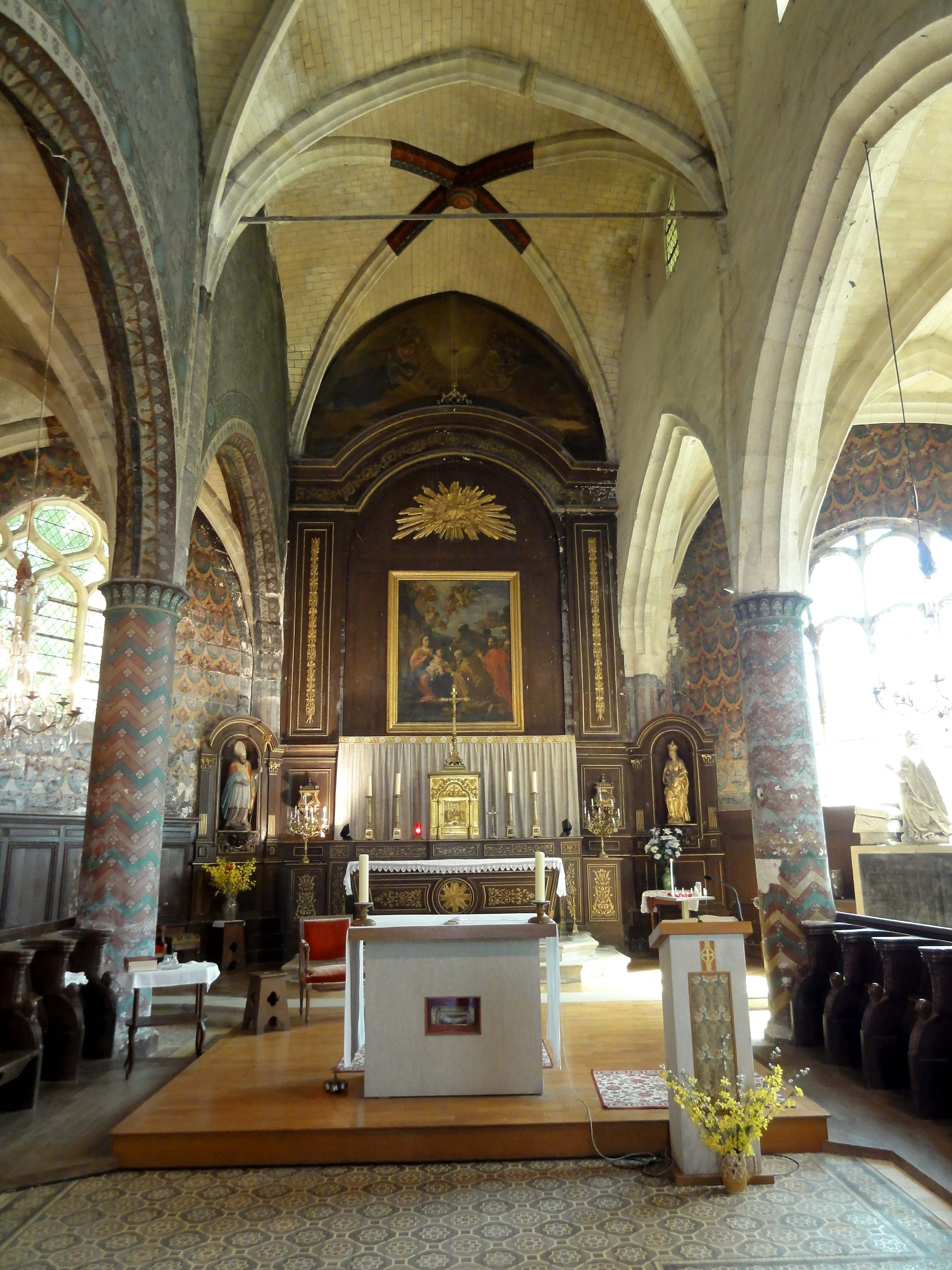 Intérieur de l'église (voir titre).